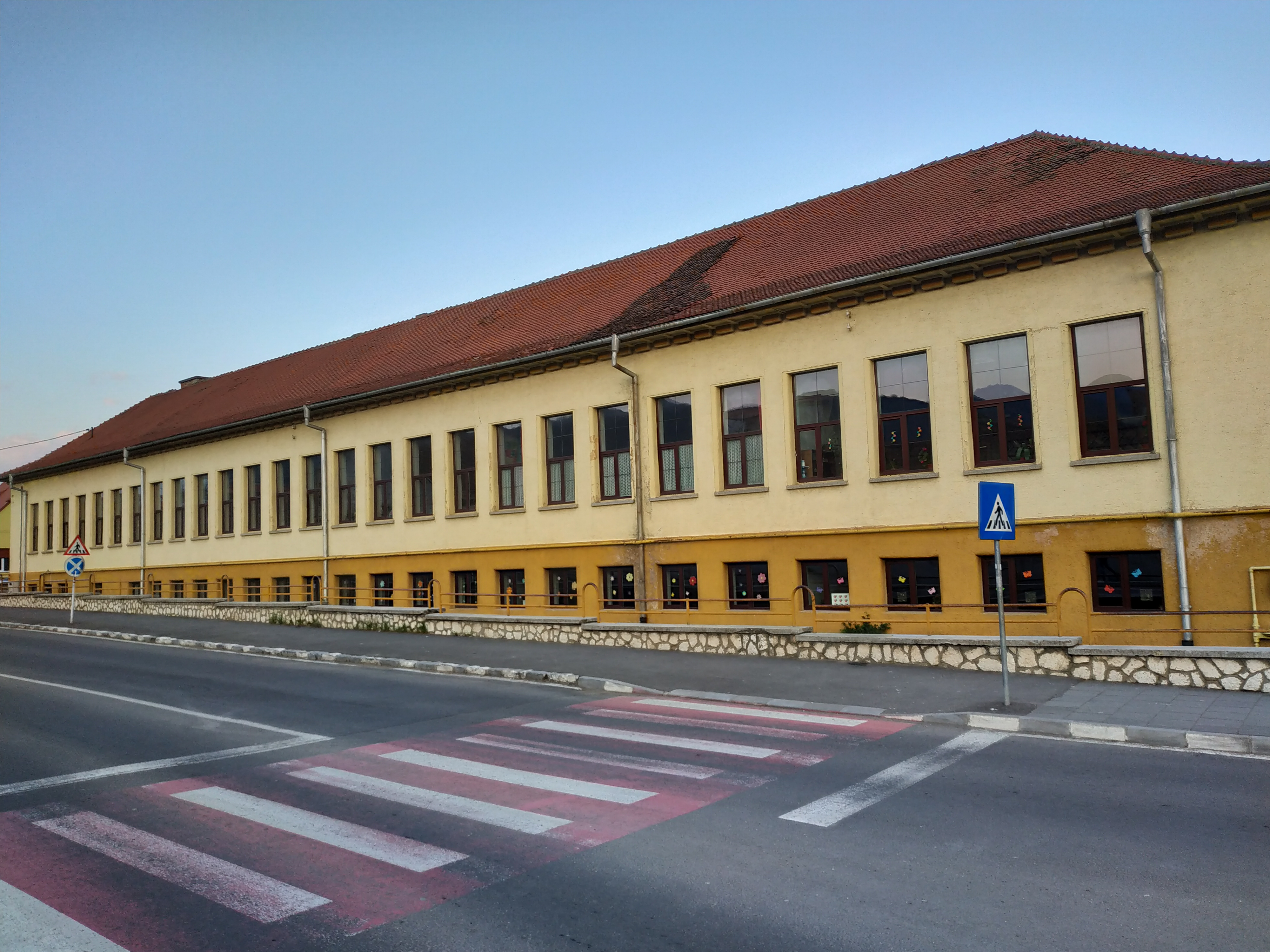 Școala germană, Str. Măgurii Nr. 4, Codlea, județul Brașov, România